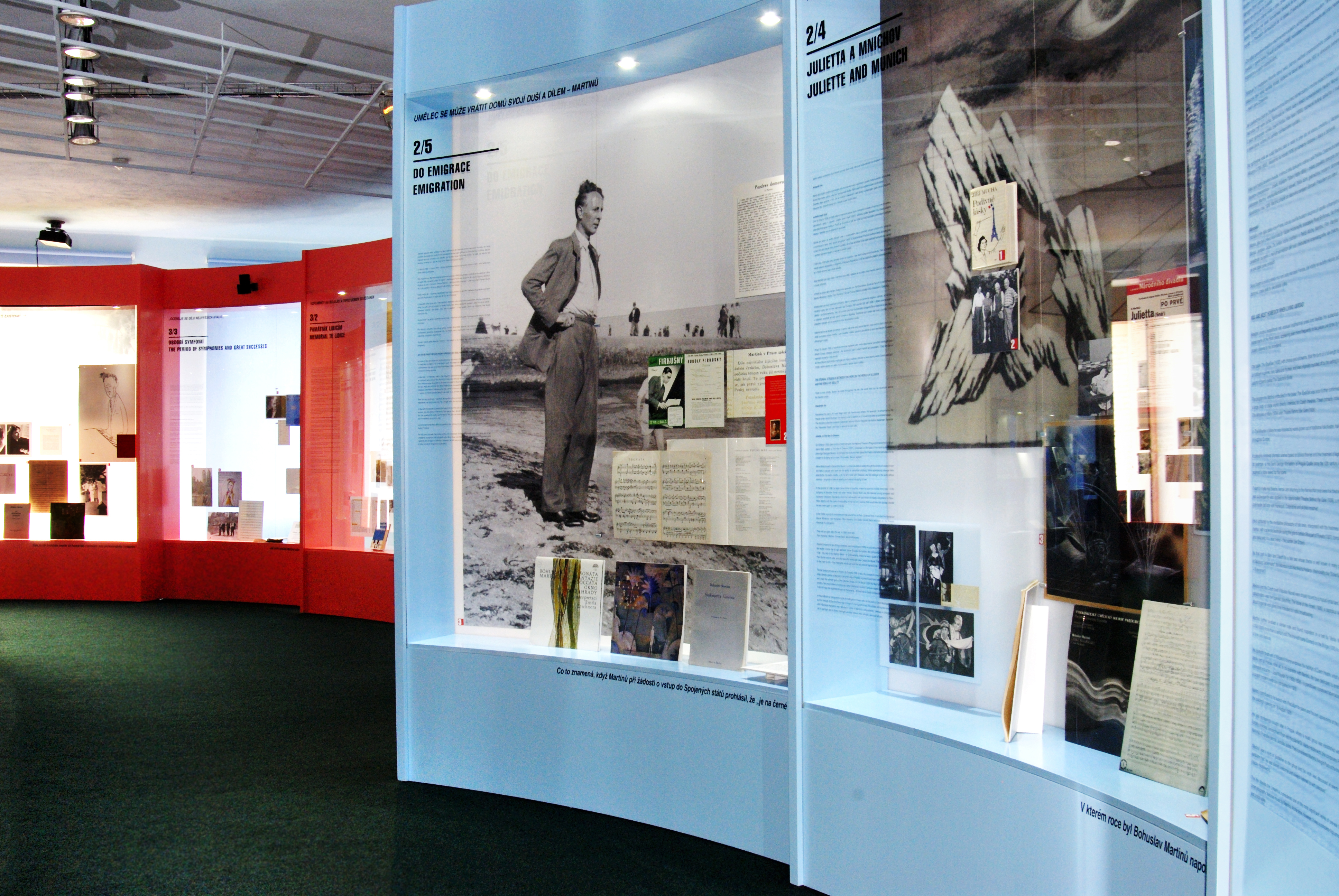 záběr z expozice B. Martinů